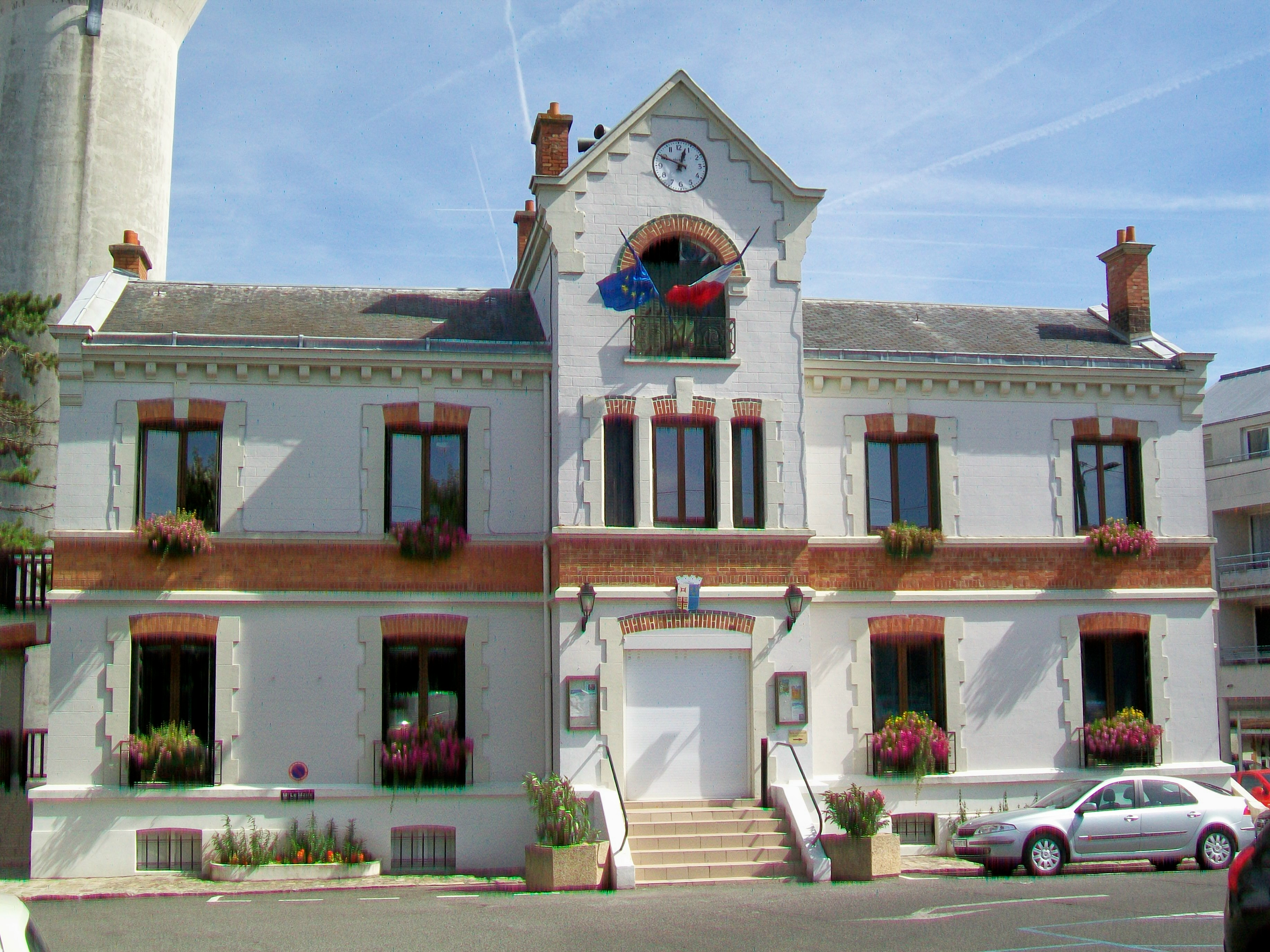 La mairie, place Jules-Rodet.